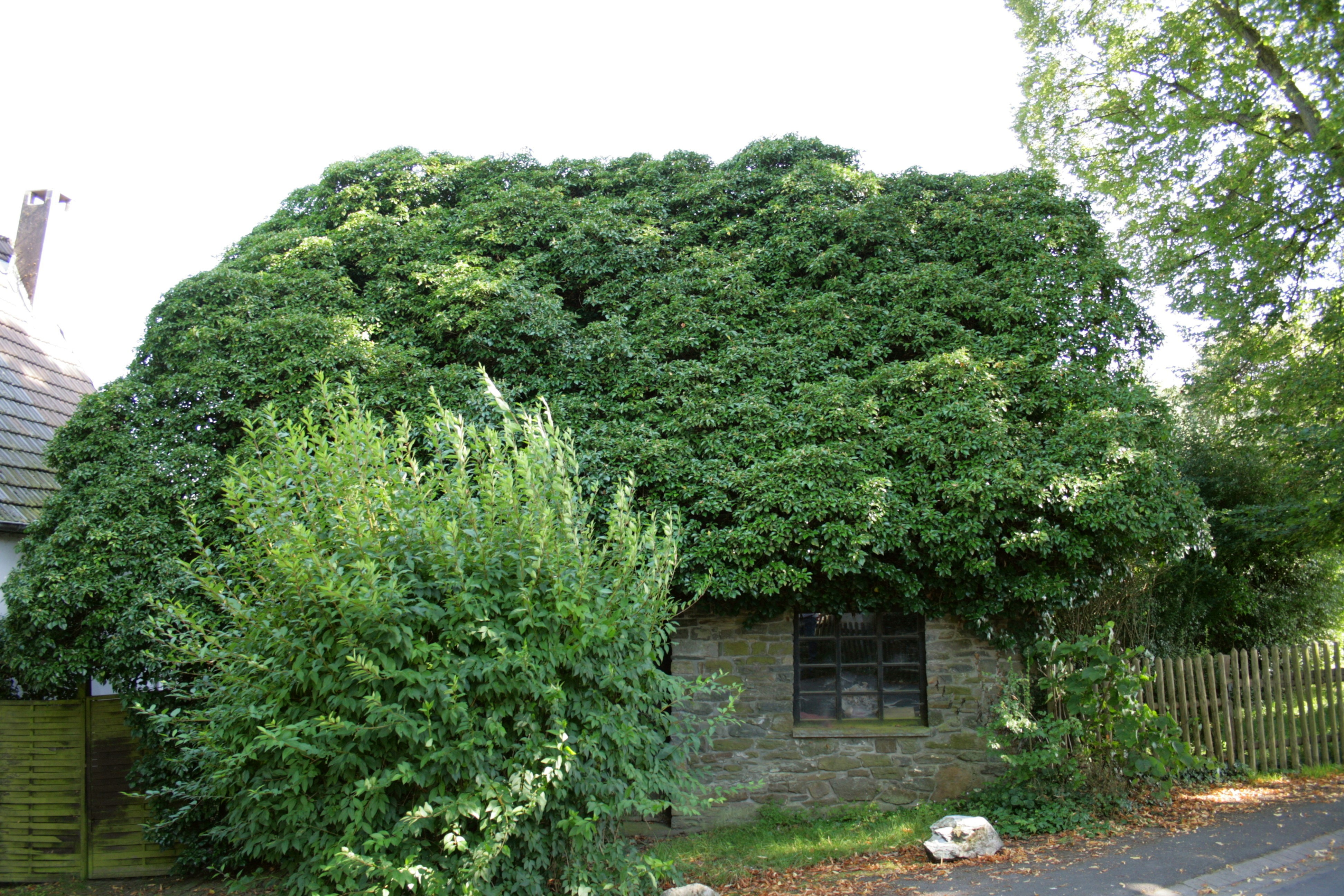 Alte Schmiede in Alt Pungelscheid in Werdohl